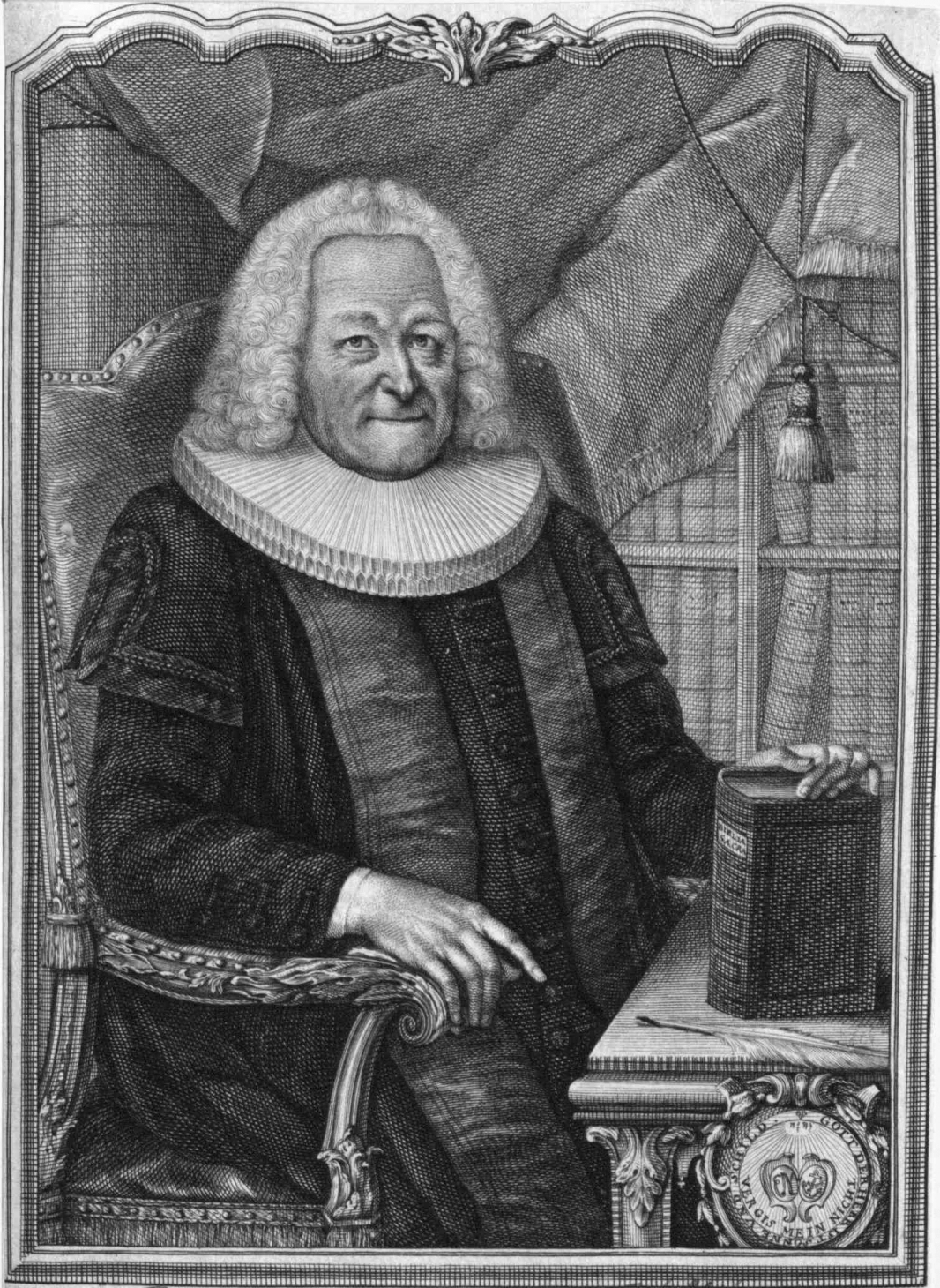 Erdmann Neumeister, German poet and librettist, by Christian Friedrich Fritzsch